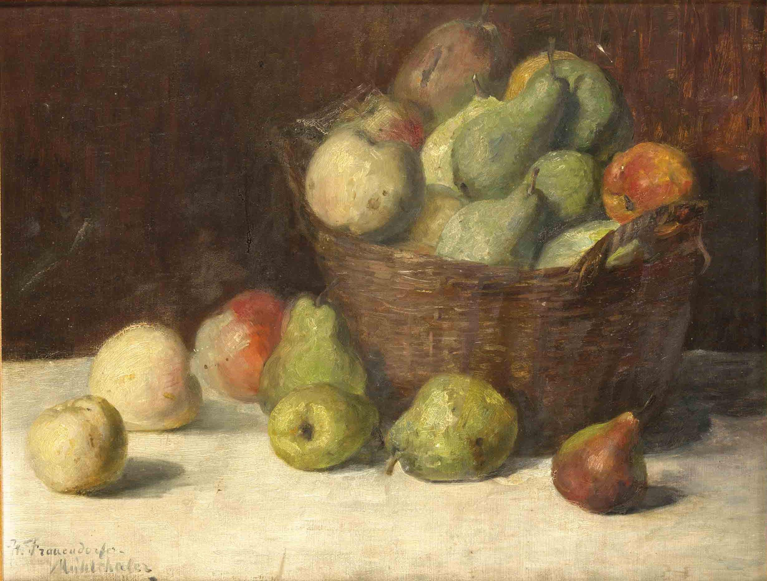 Obststilleben